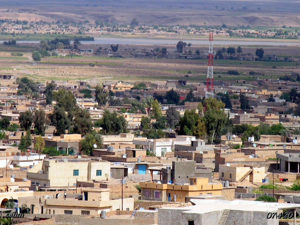 الزوية قبل غزوة داعش